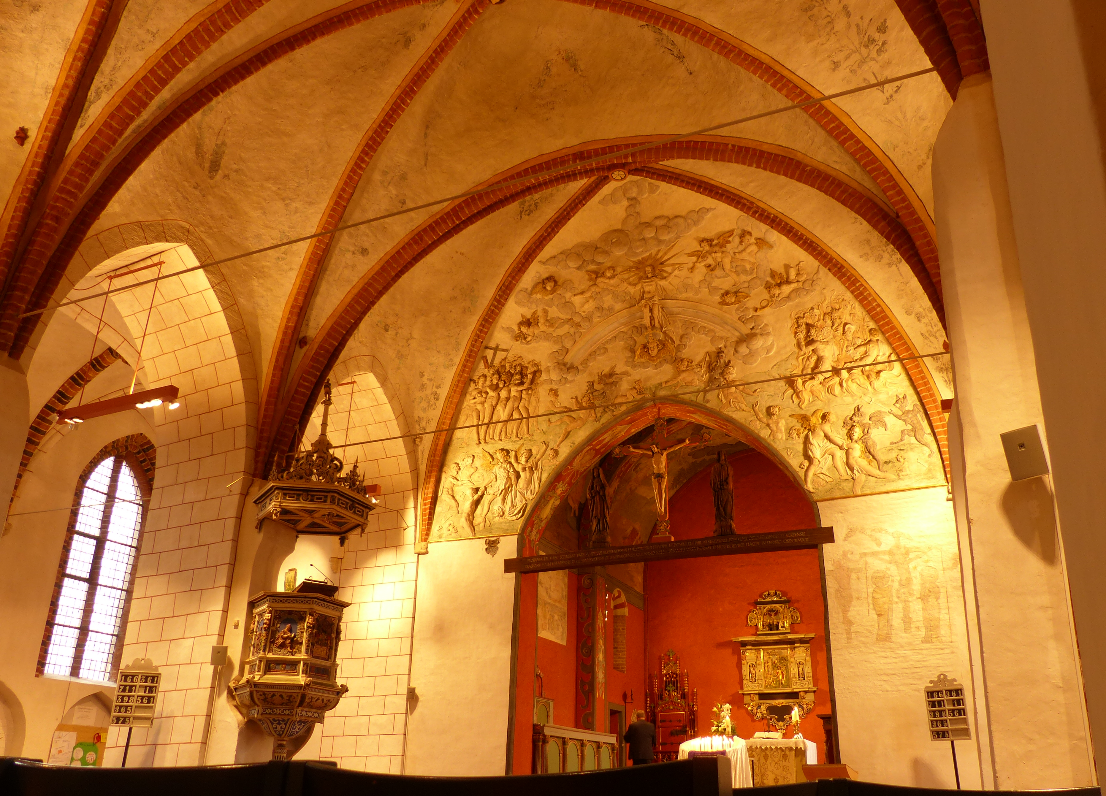 Mittelschiff und Chor der Johanniskirche in Verden